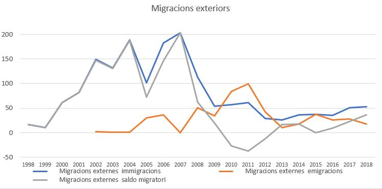 w